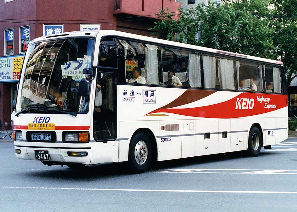 京王帝都電鉄 はかた 三菱ふそう エアロクィーンM U-MS729S 三菱車体